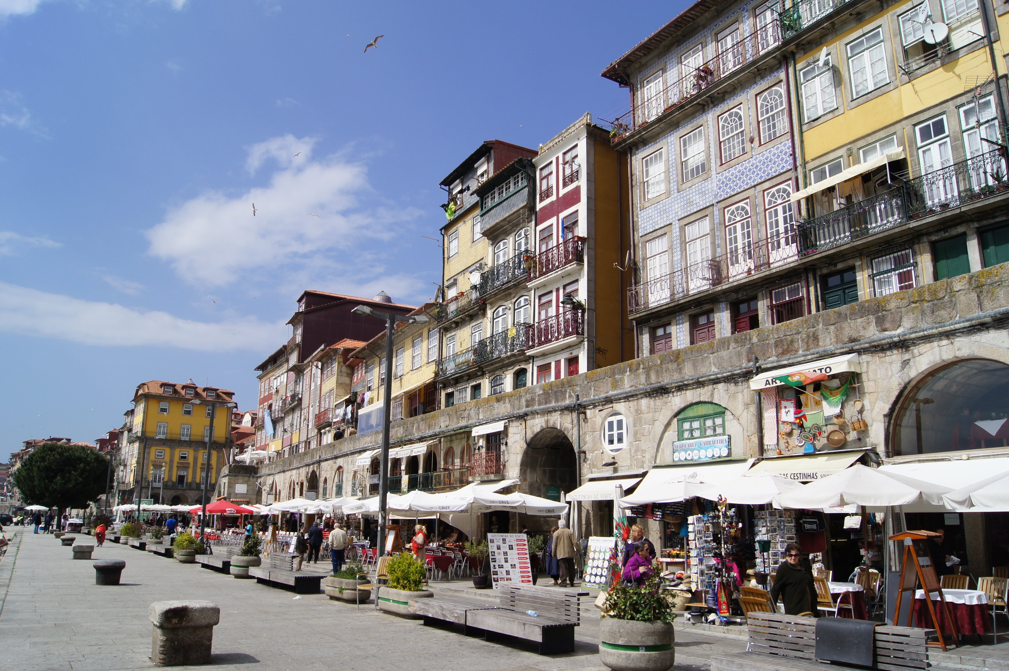 Cais da Ribeira